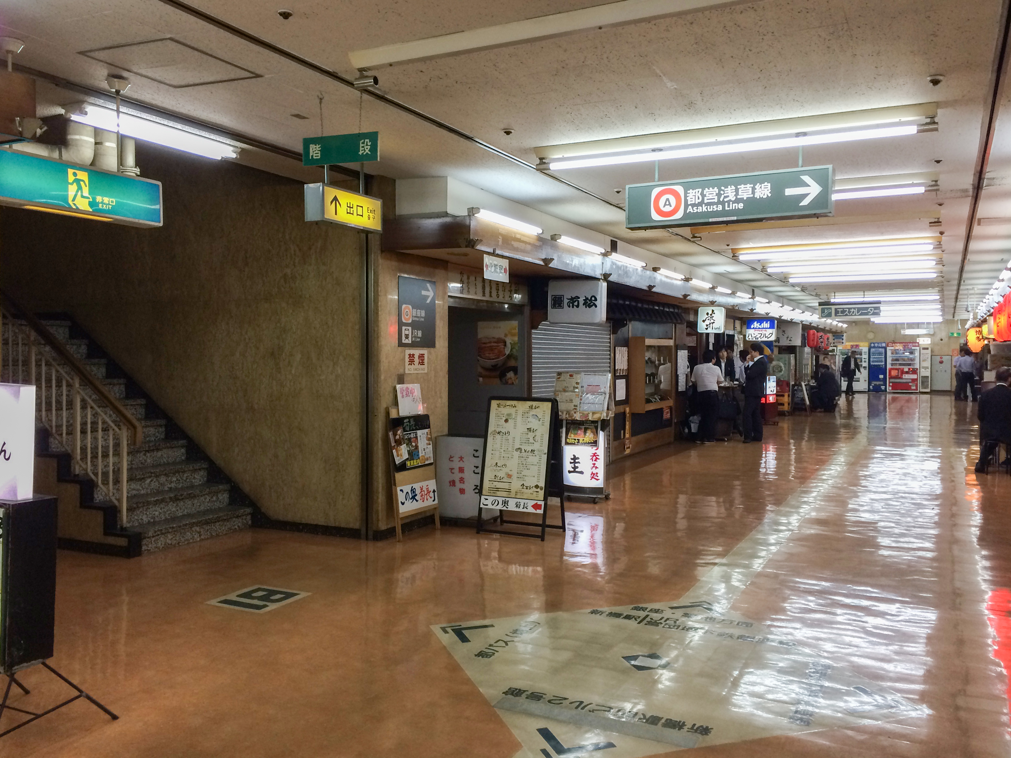 新橋駅前ビル1号館地下通道